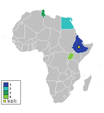 아프리카 네이션스컵 1962년 지도